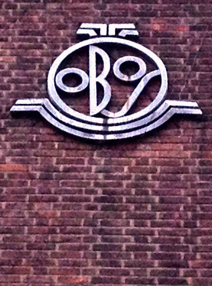 OBOS-emblem på gavlvegg på blokk ved Carl Berners plass, Oslo